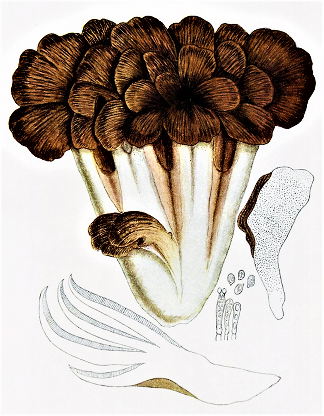 Giacomo Bresadola: Polyporus frondosus (Dicks., 1785) Gray (1821), heute Grifola frondosa Fr. (1821)